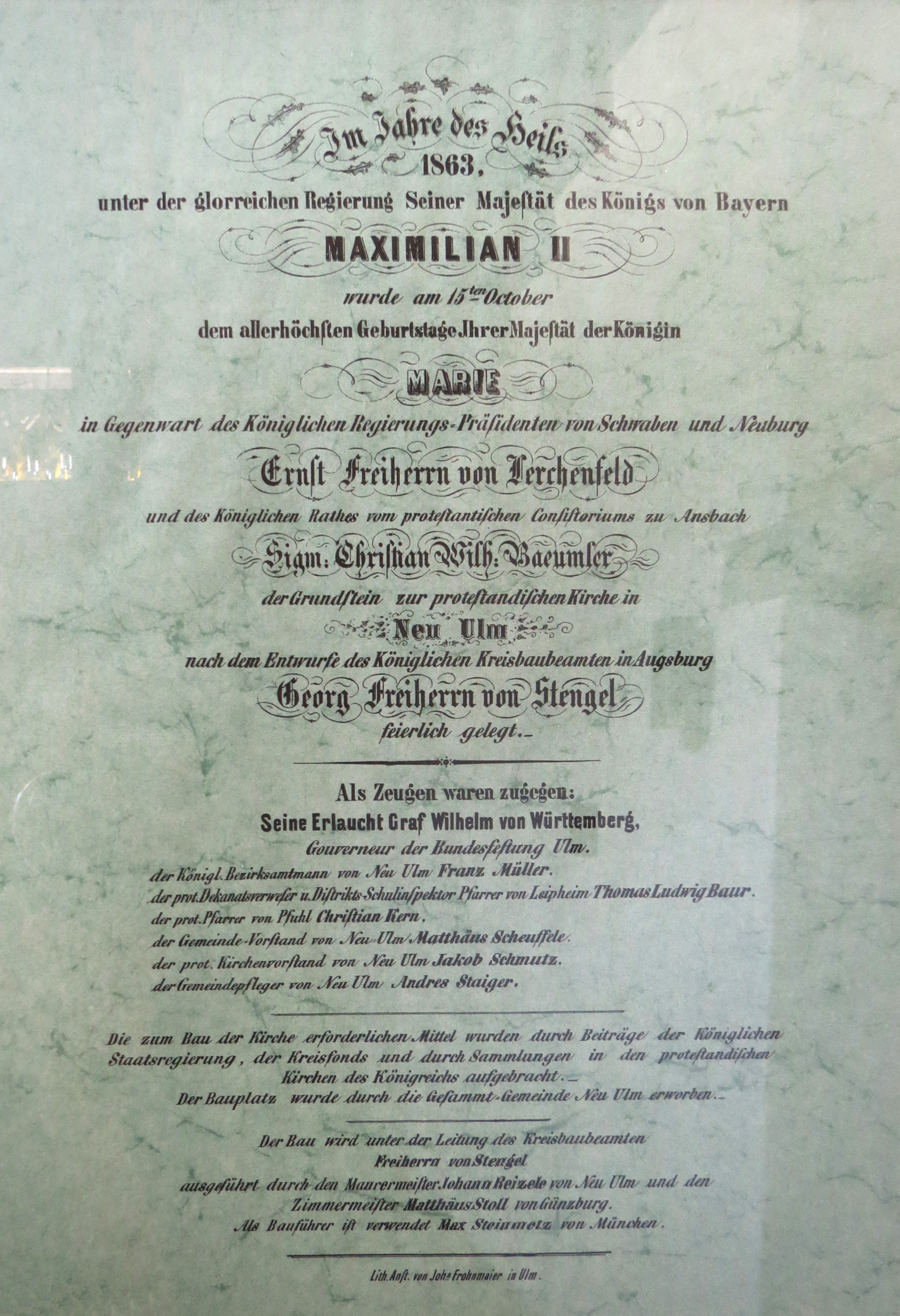 Petruskirche Neu-Ulm, Urkunde zur Grundsteinlegung